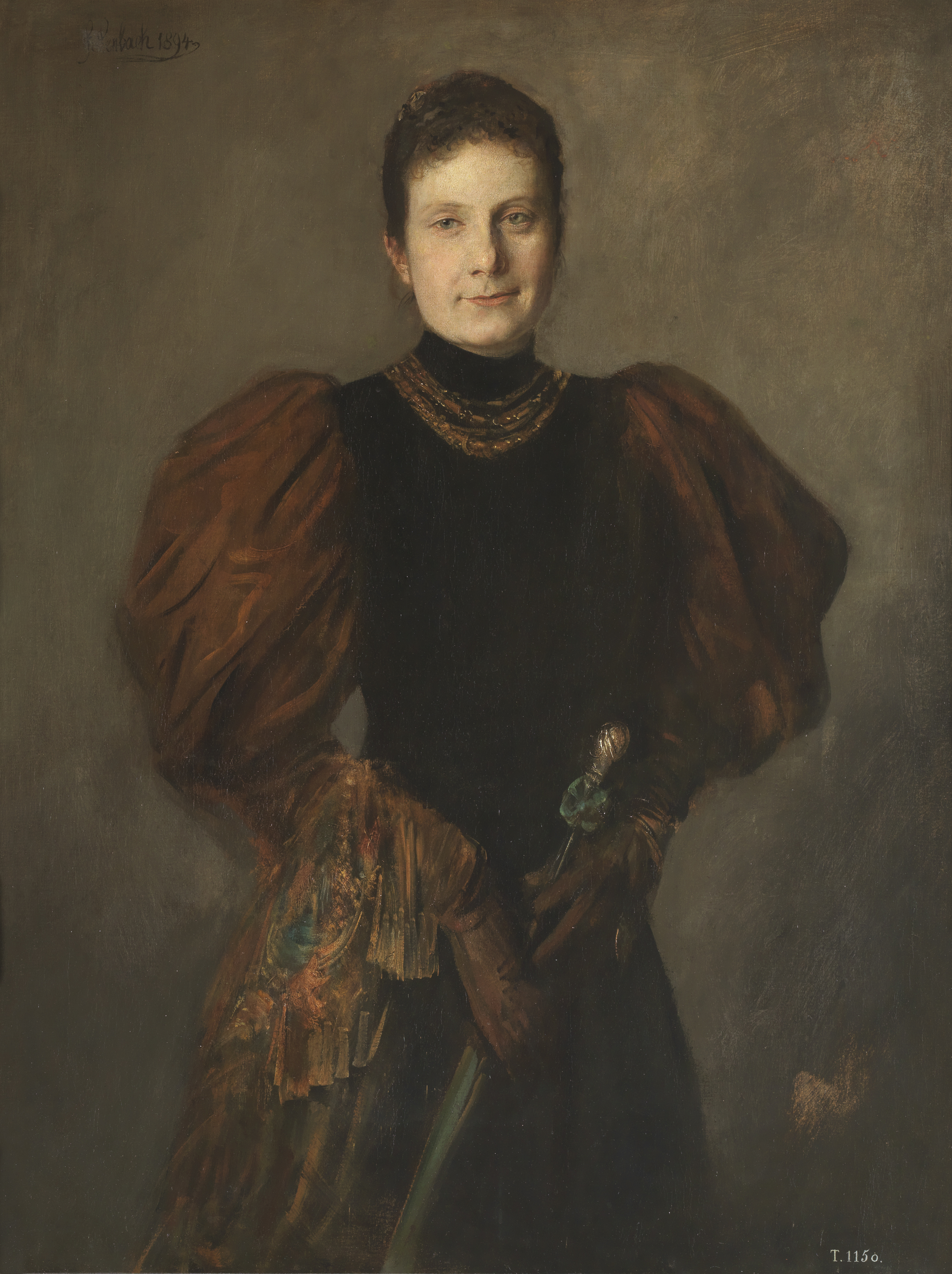 Retrato de María de la Paz de Borbón (1862-1946), infanta de España e hija de la reina Isabel II de España.